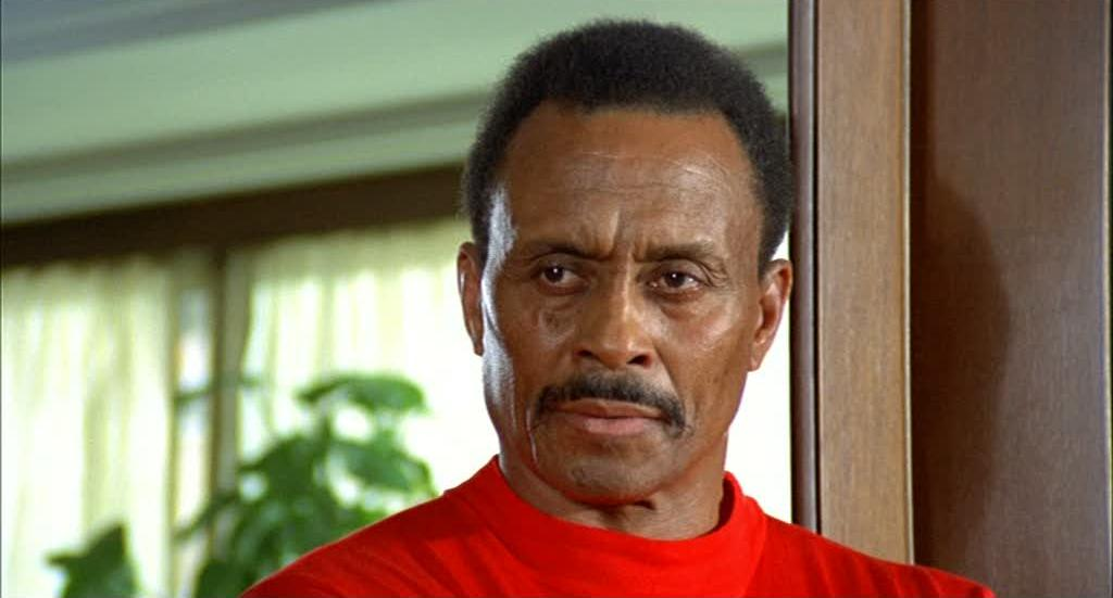 Screenshot del film La mala ordina di Fernando Di Leo.